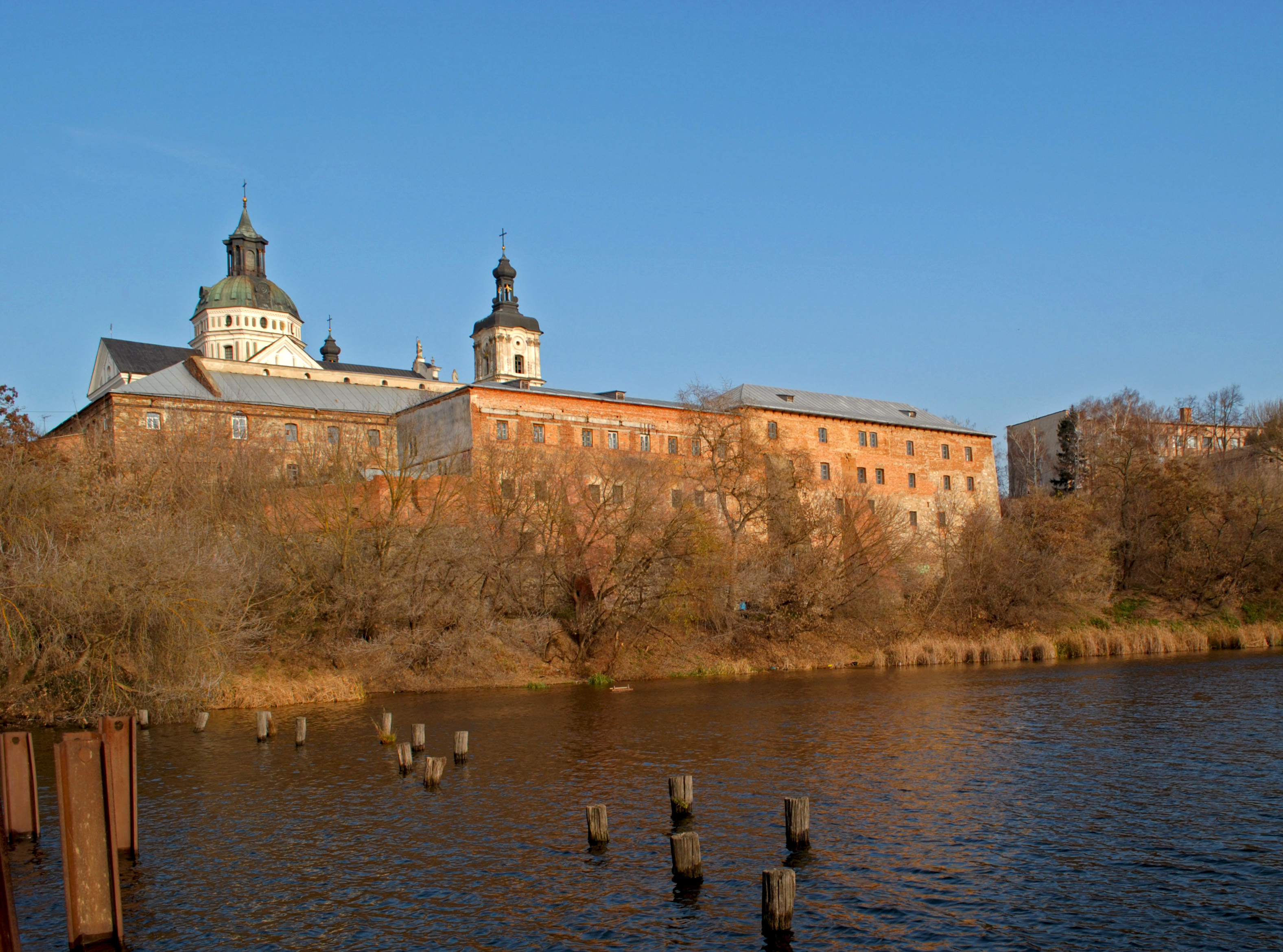 Кармелітський монастир, Бердичів, Соборна пл., 25